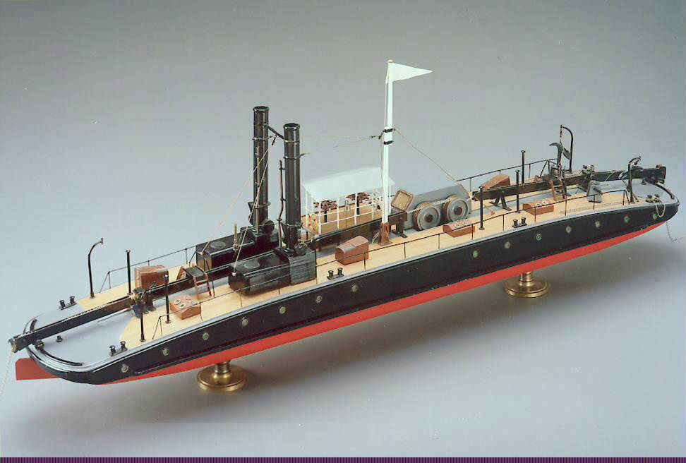 Model eines Kettenschleppers vom Neckar (EVZ: 1989/1479)